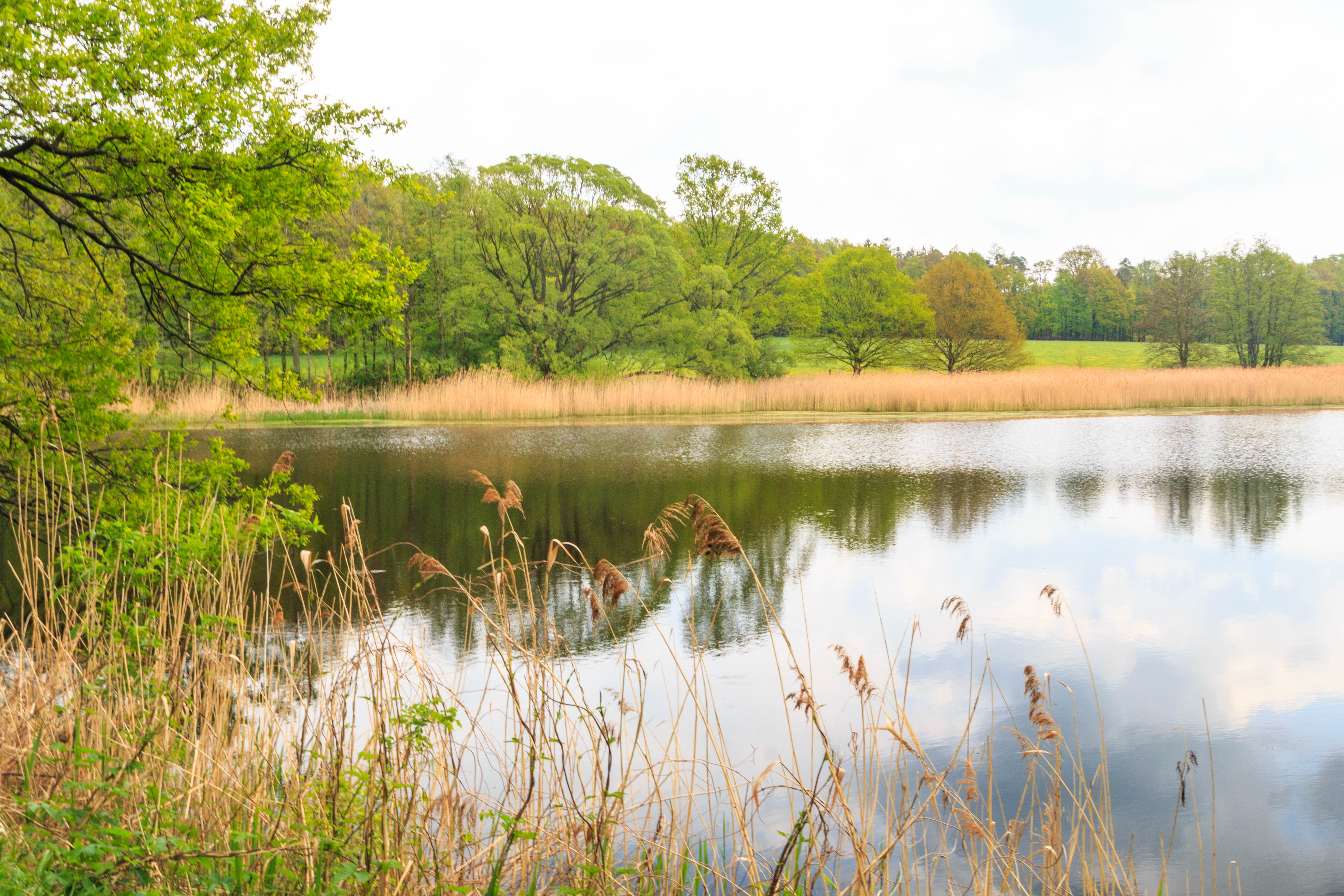 Rybník Třešňovec u Urbanic Project: Vodstvo.